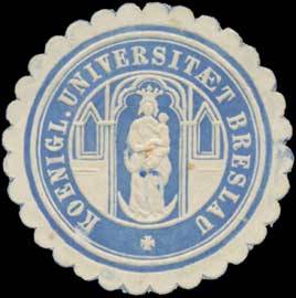 Sealing stamp Title: K. Universität Breslau Description: Universitaet, blau, weiß, geprägt Place: Breslau size: 4 cm